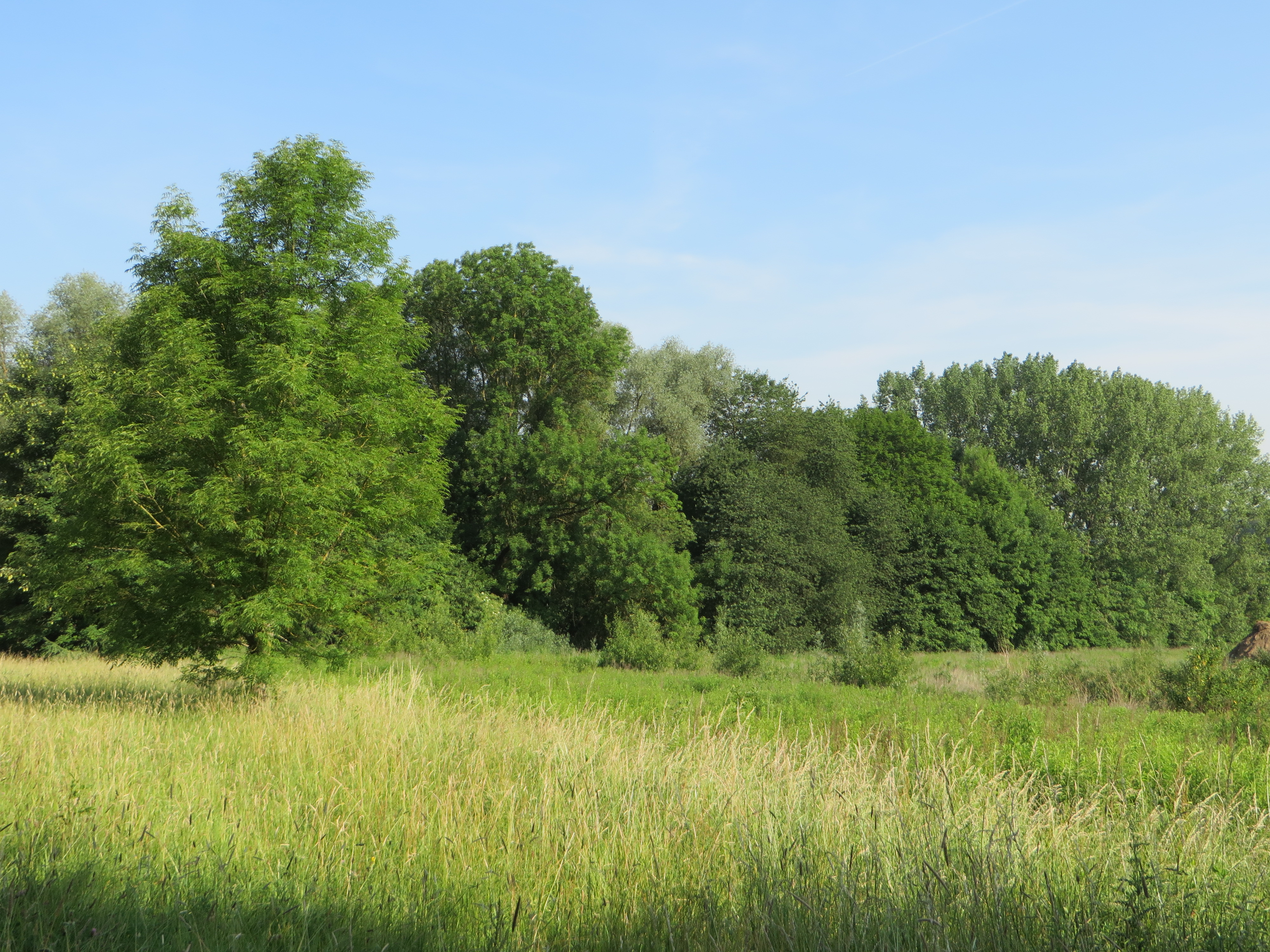 Geschützter Landschaftsbestandteil 1.4.2.38 „Hopfengarten“ in Hagen nordöstlich des Autobahnkreuzes Hagen nahe bei Herbeck. Es handelt sich um einen Abschnitt der Talaue des Ölmühlenbaches mit Feuchtwiesen, Auwaldresten (Bach-Erlen-Eschenwald) und einem Seggensumpf im Landschaftsschutzgebiet Herbeck.